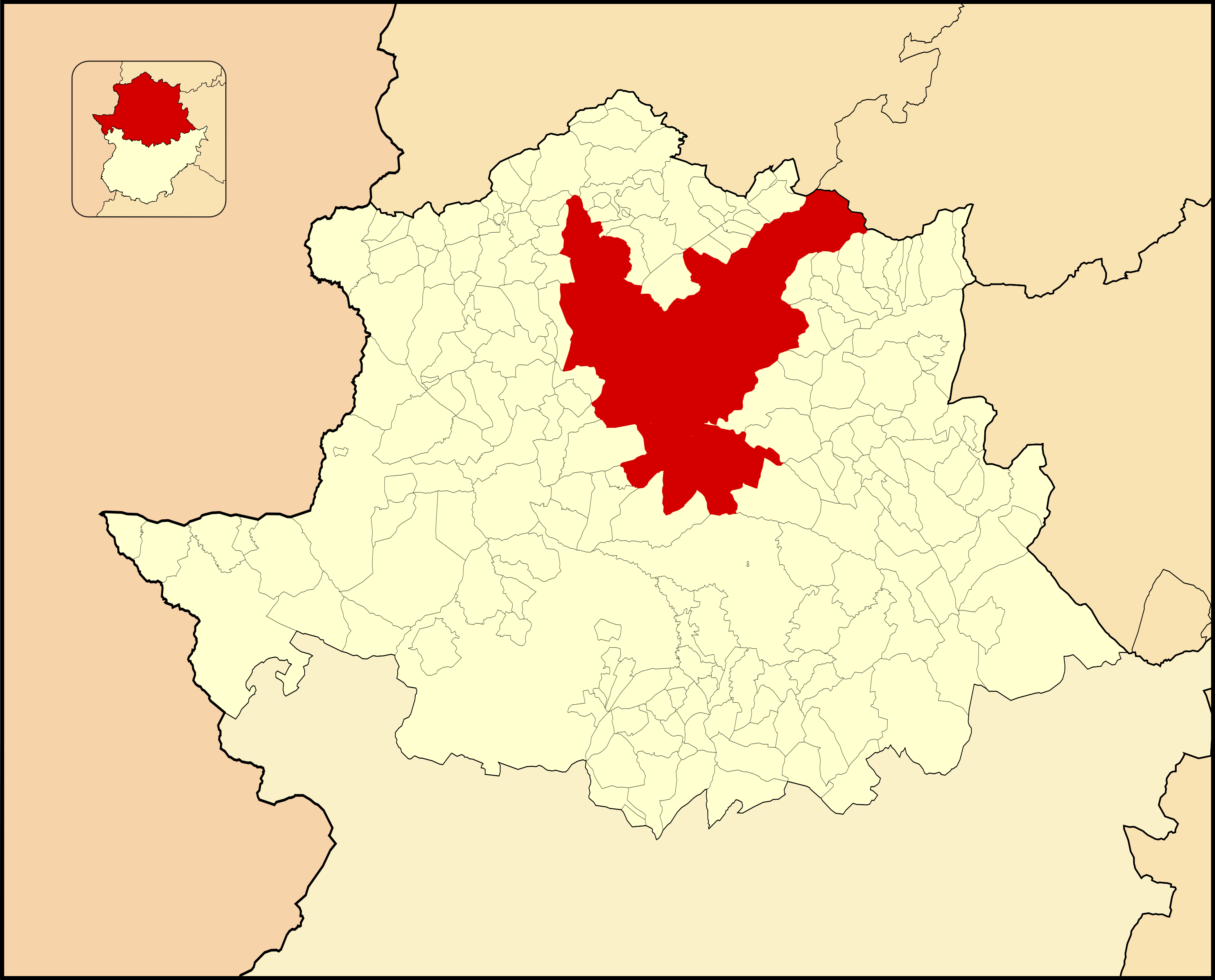 Situación de la comarca de Plasencia